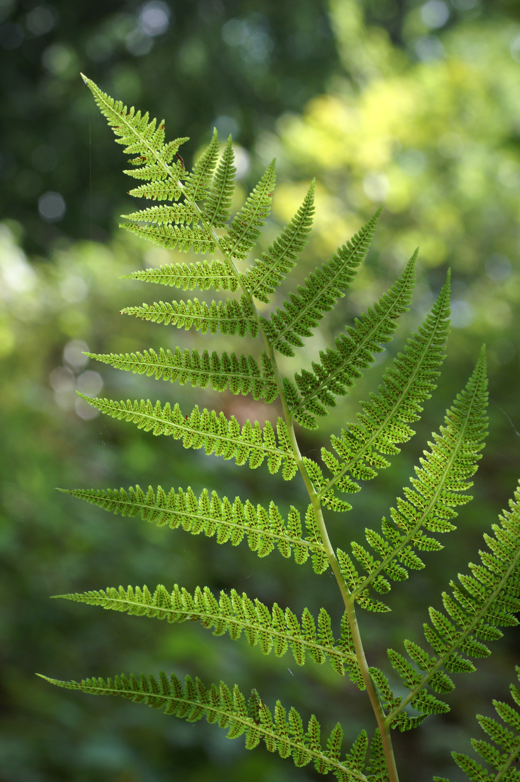 Farnwedel im Gegenlicht - nur einfach schön! – Gemeiner Frauenfarn (Athyrium filix-femina)